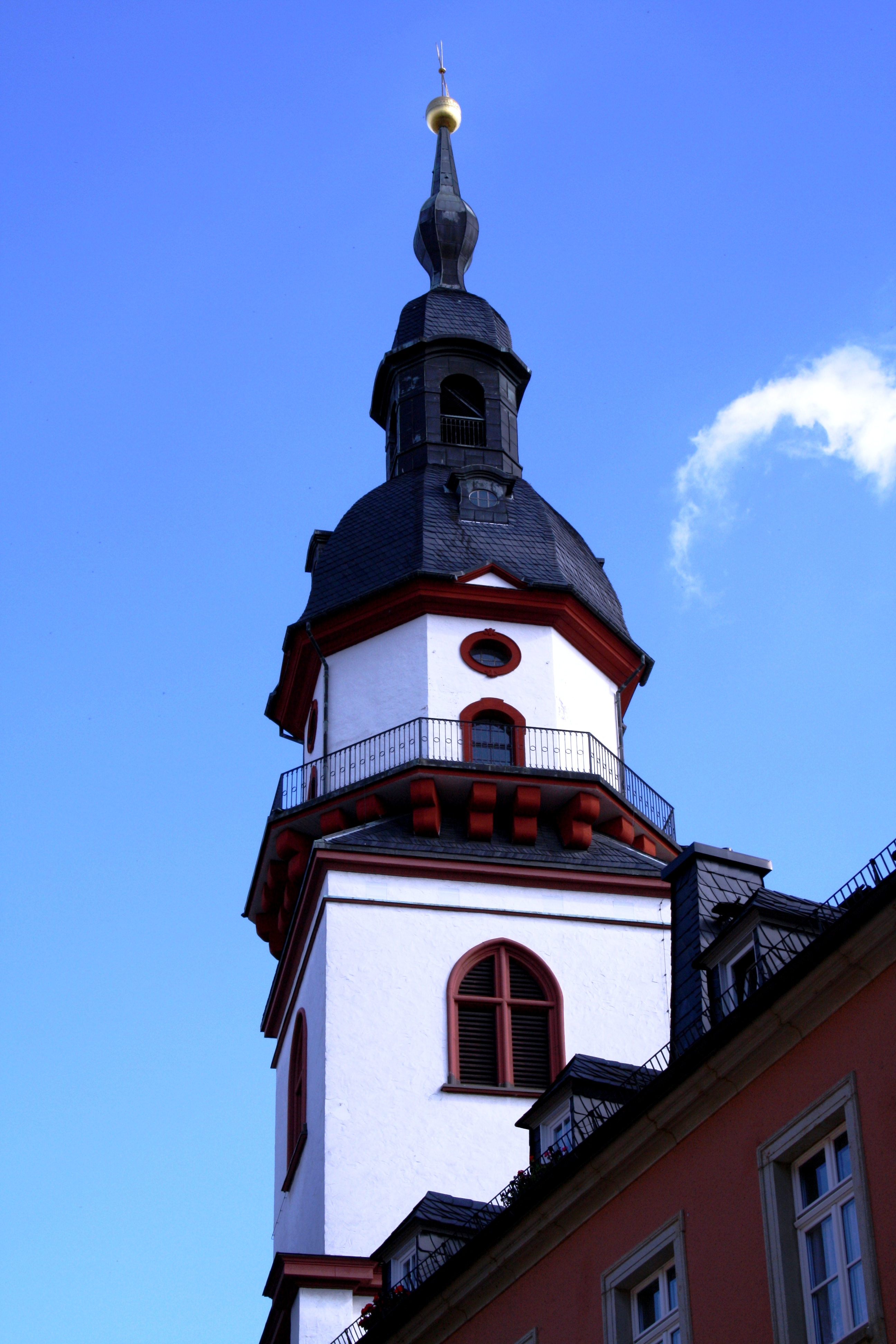 Blick aus dem Kirchgässchen auf den Hohen Turm der Stadtkirche St. Jakobi in Chemnitz